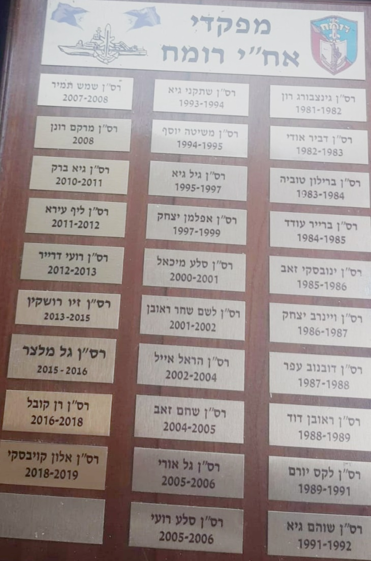 שלט רשימת מפקדי אח"י רומח